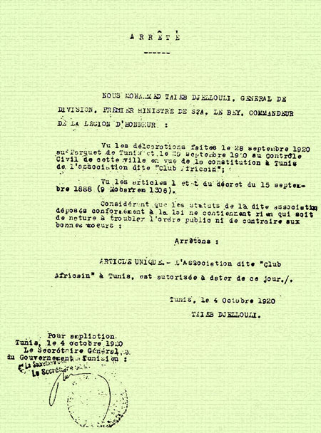 Acte de naissance du Club africain